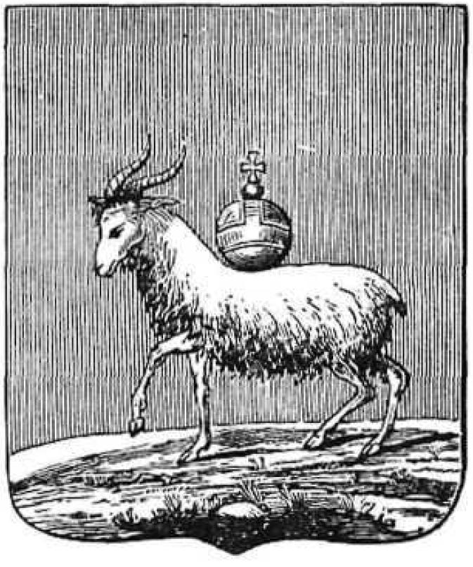 Гербы городов Российской империи